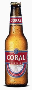 CORAL BEER - 33cl